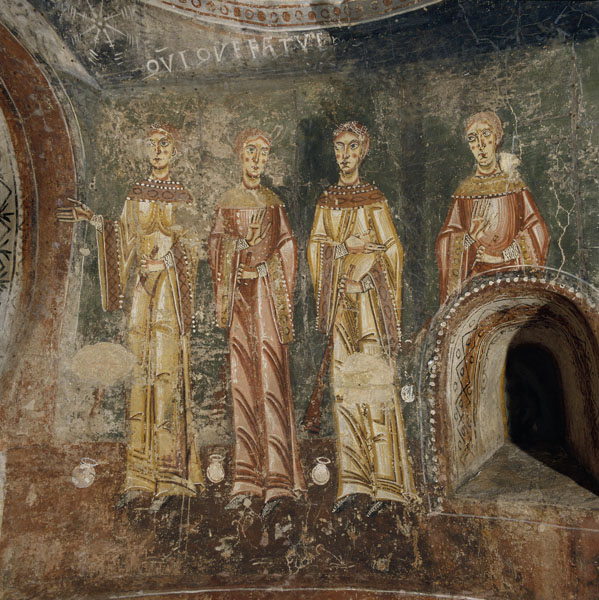 Pintures de Pedret- Absis sud de pedret. MNAC